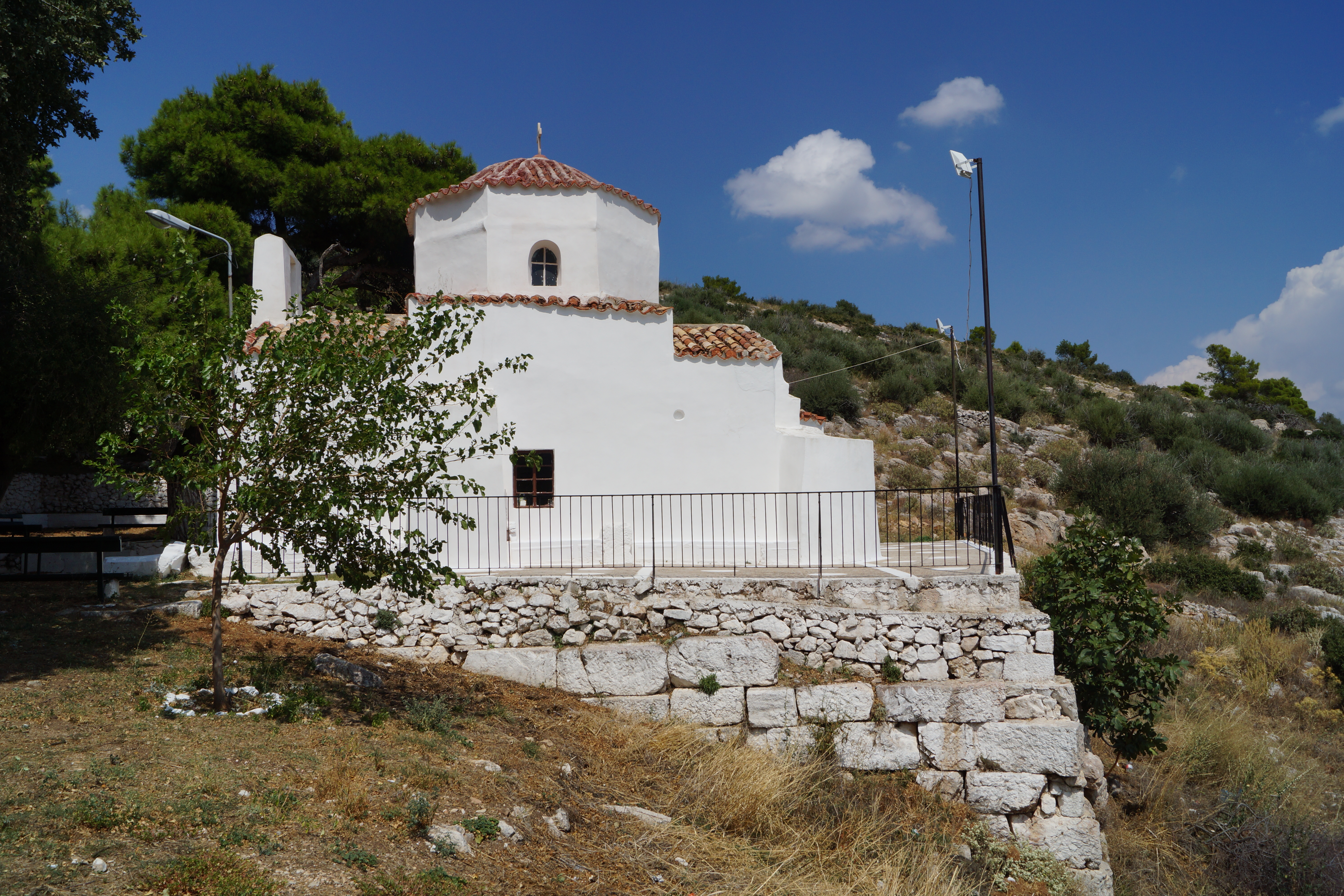 Προγήτης Ηλίας Υμηττού με εμφανή τα θεμέλια του αρχαίου ναού του Προοψίου Απόλλωνα«Προφήτης Ηλίας Υμηττού - Κορωπί»